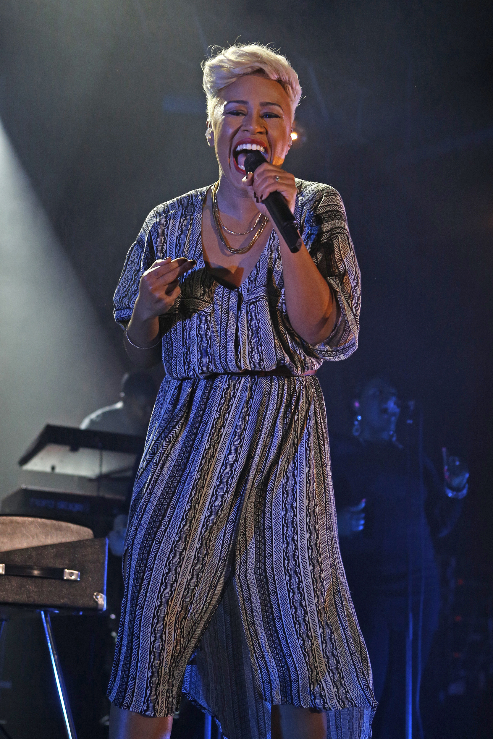 Die schottische Sängerin Emeli Sandé steht in der Stadthalle in Offenbach am Main auf der Bühne.